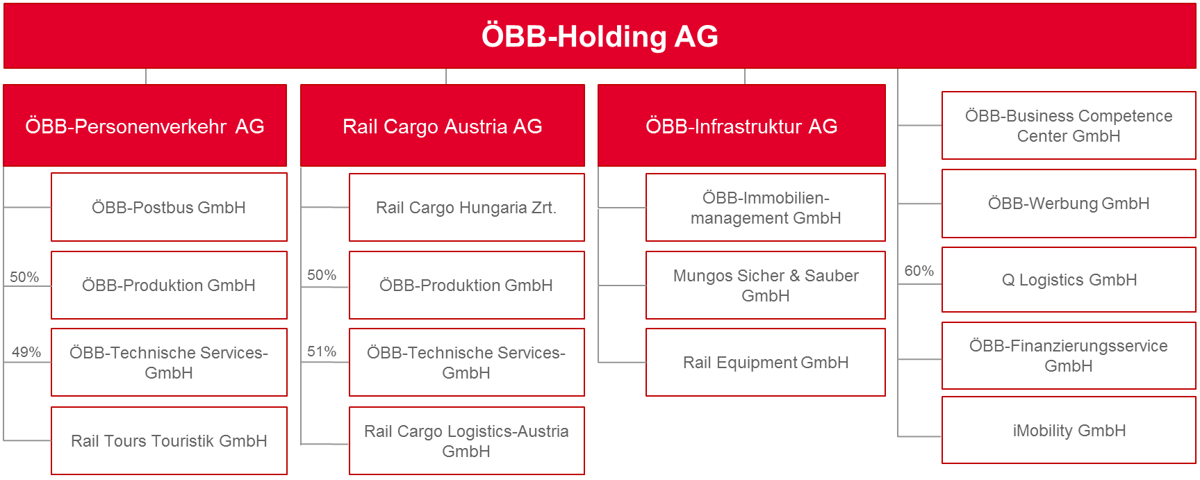 Organigramm ÖBB Konzern, Stand: 30.8.2017